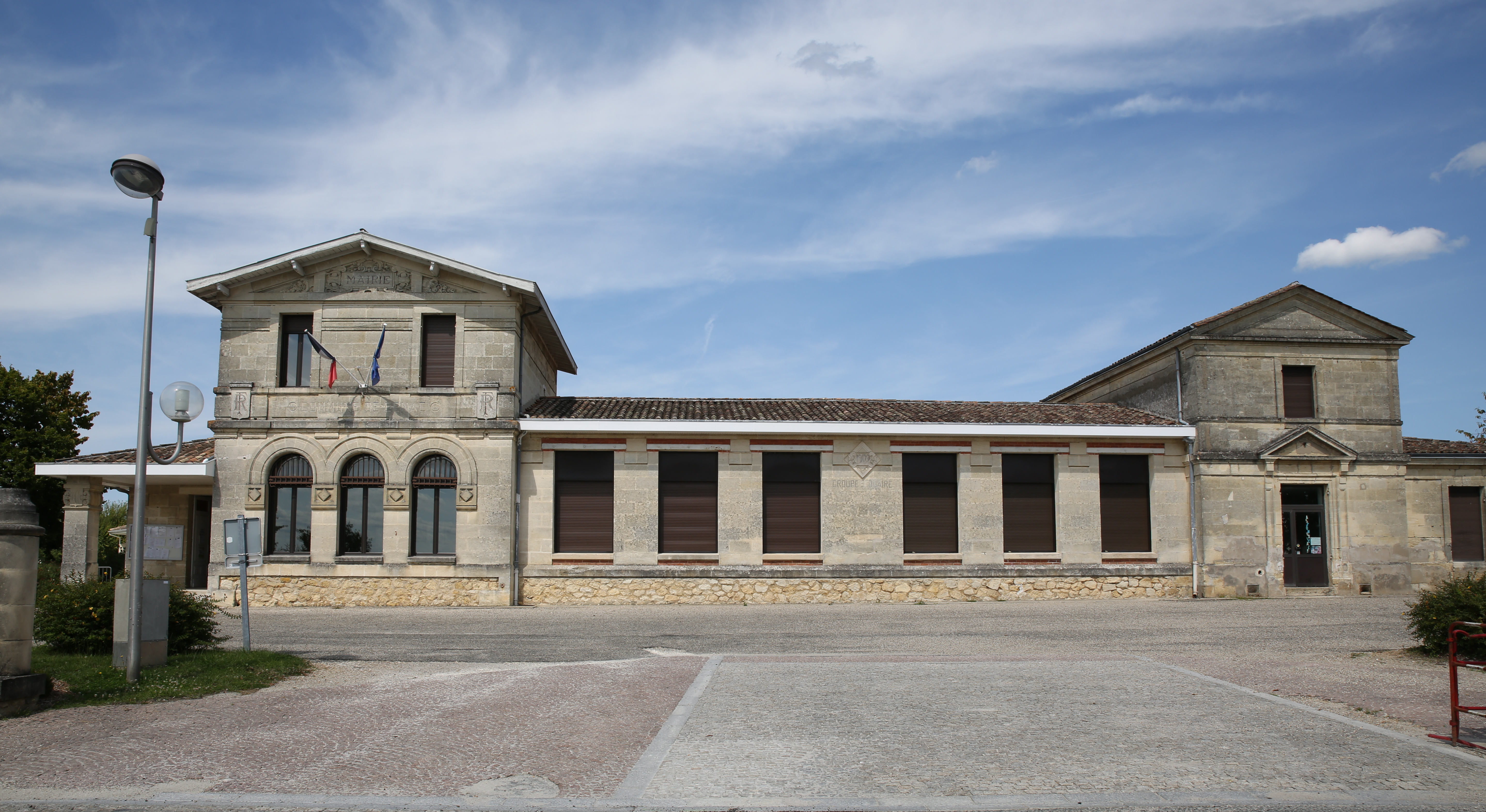 Mairie de Cénac